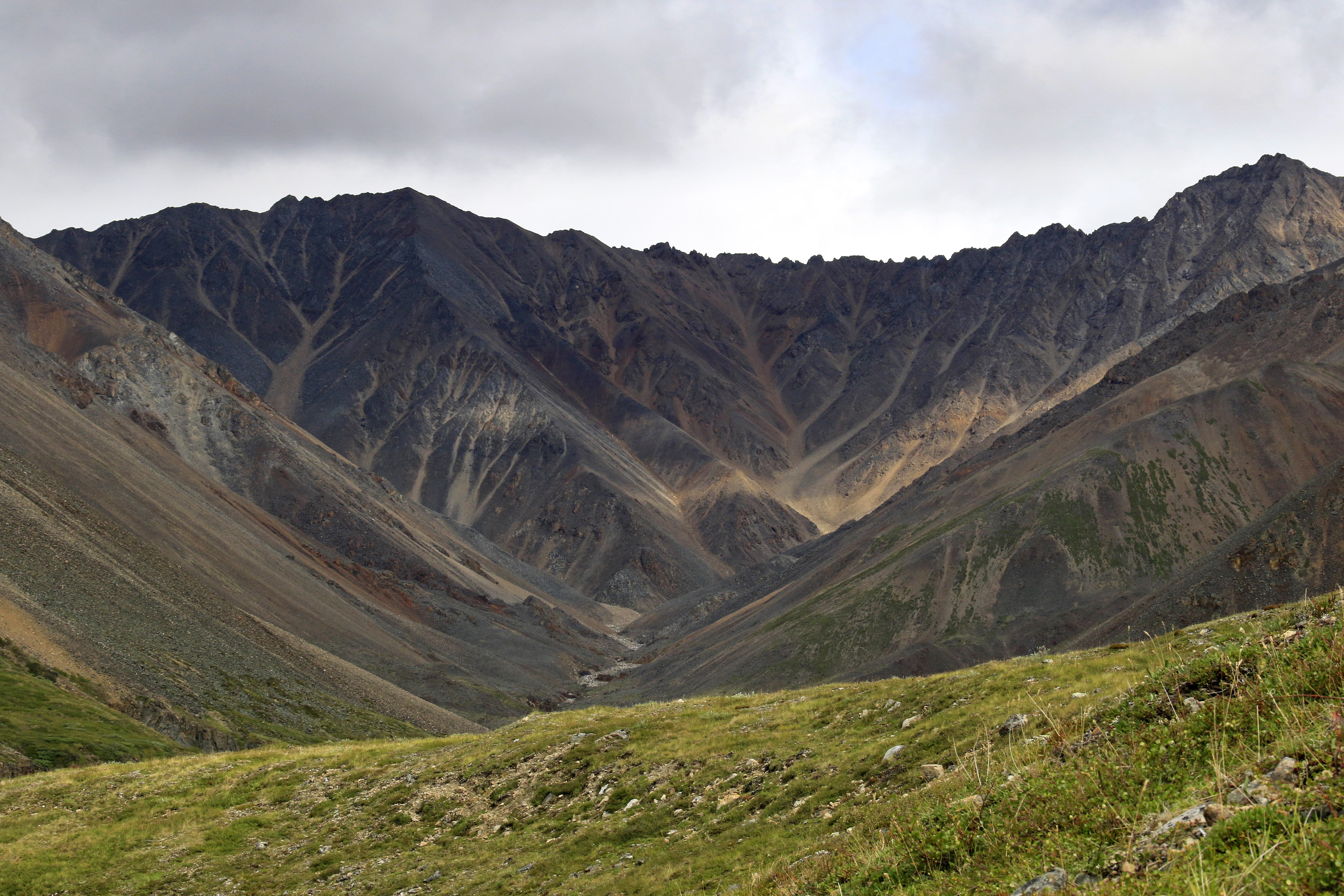 Момский: Расположен в восточной части Момо-Селенняхской впадины и охватывает собой территорию верхней части бассейна реки Момы, включая Буордахский горный массив с пиком г. Победа (3 003 м), Момский район, Якутия (Саха) This image is related to the protected area of Russia number 1410127